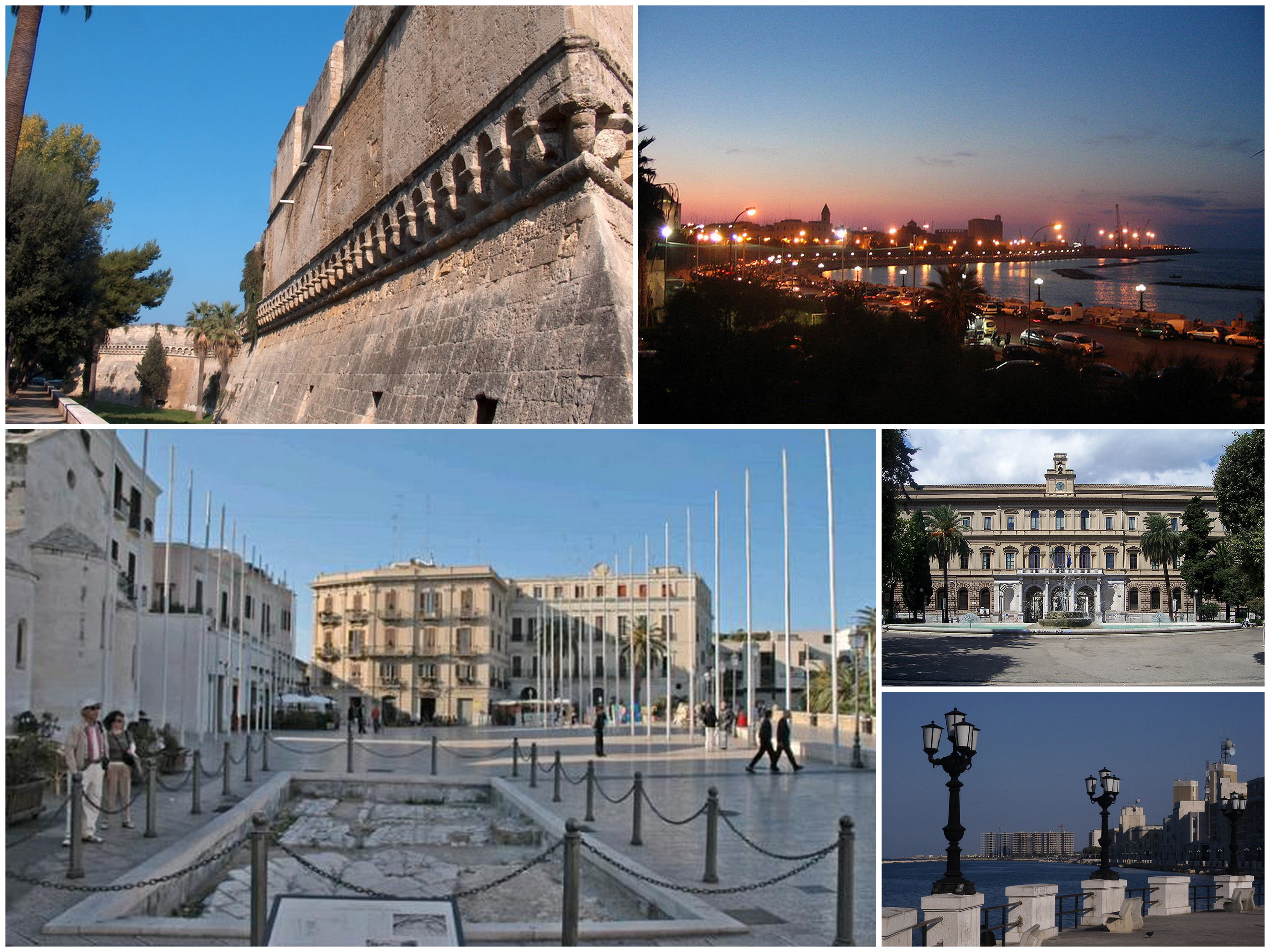 Collage di varie foto di Bari